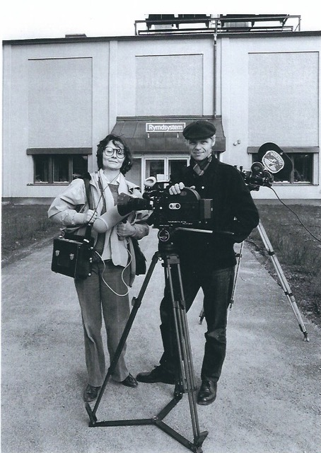 Stefania och Carl Henrik Svenstedt under inspelningen av dokumentärfilmen De lyckliga ingenjörerna, Approaching Zero.